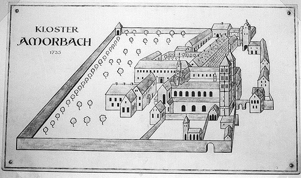 Amorbach 1735 Infotafel/Repro: Alexander Buschorn (1978)